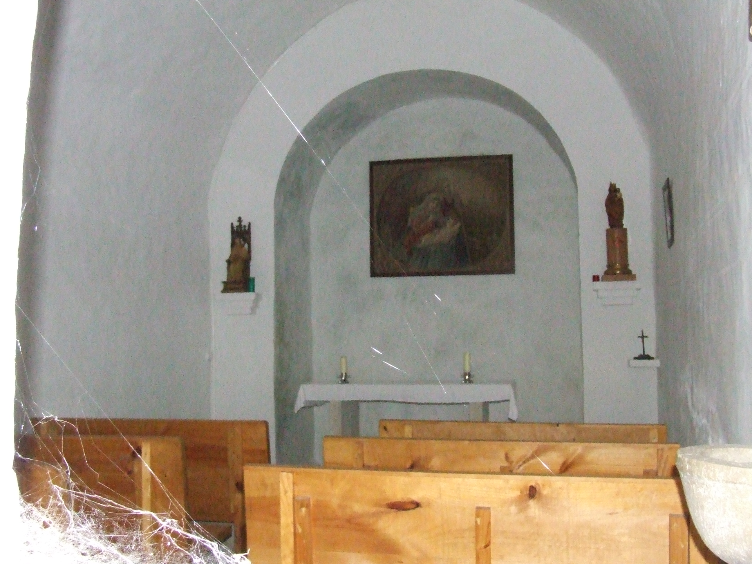 Sant Josep de la Talladella (Castellcir, Moianès)